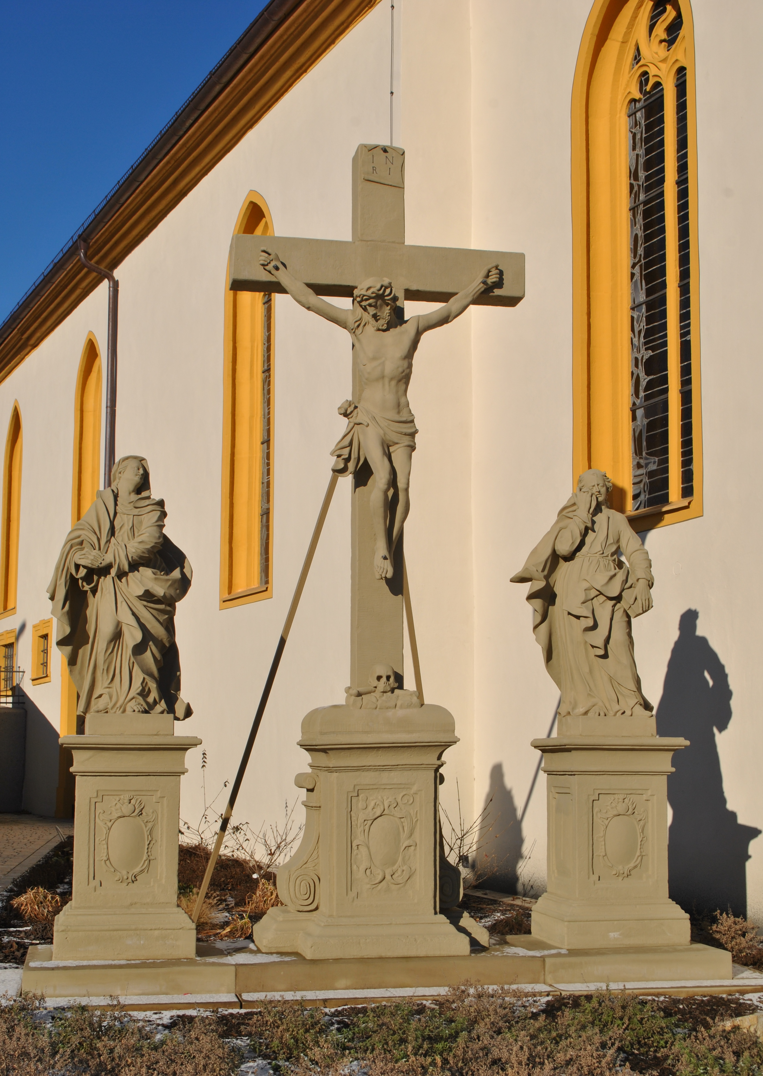 Kreuzigungsgruppe Wohl von Luca van der Auvera, 1750 D-6-75-174-198